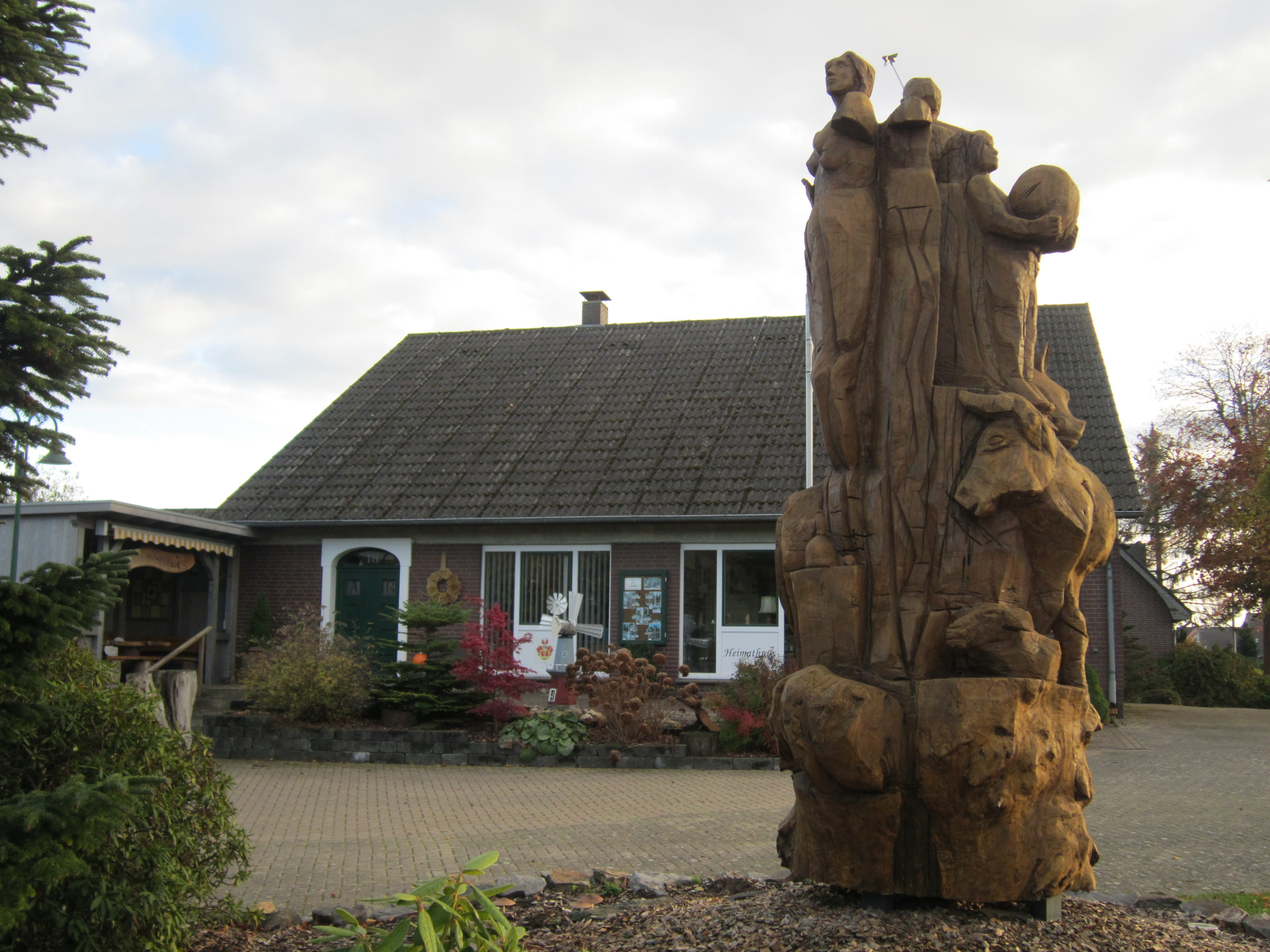 Holzskulptur "Karussell des Lebens vor dem Heimathuus Lutten (Gemeinde Goldenstedt, Landkreis Vechta, Niedersachsen)